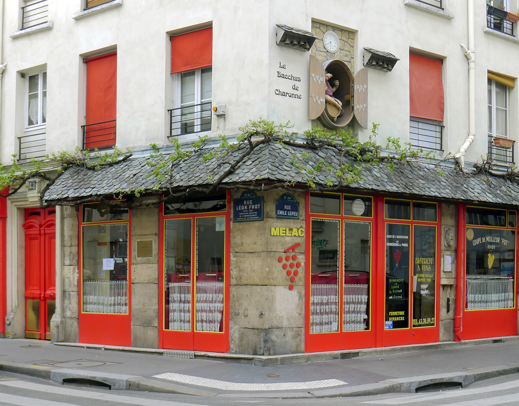 Café le Bacchus de Charonne, siège des vignerons de Paris